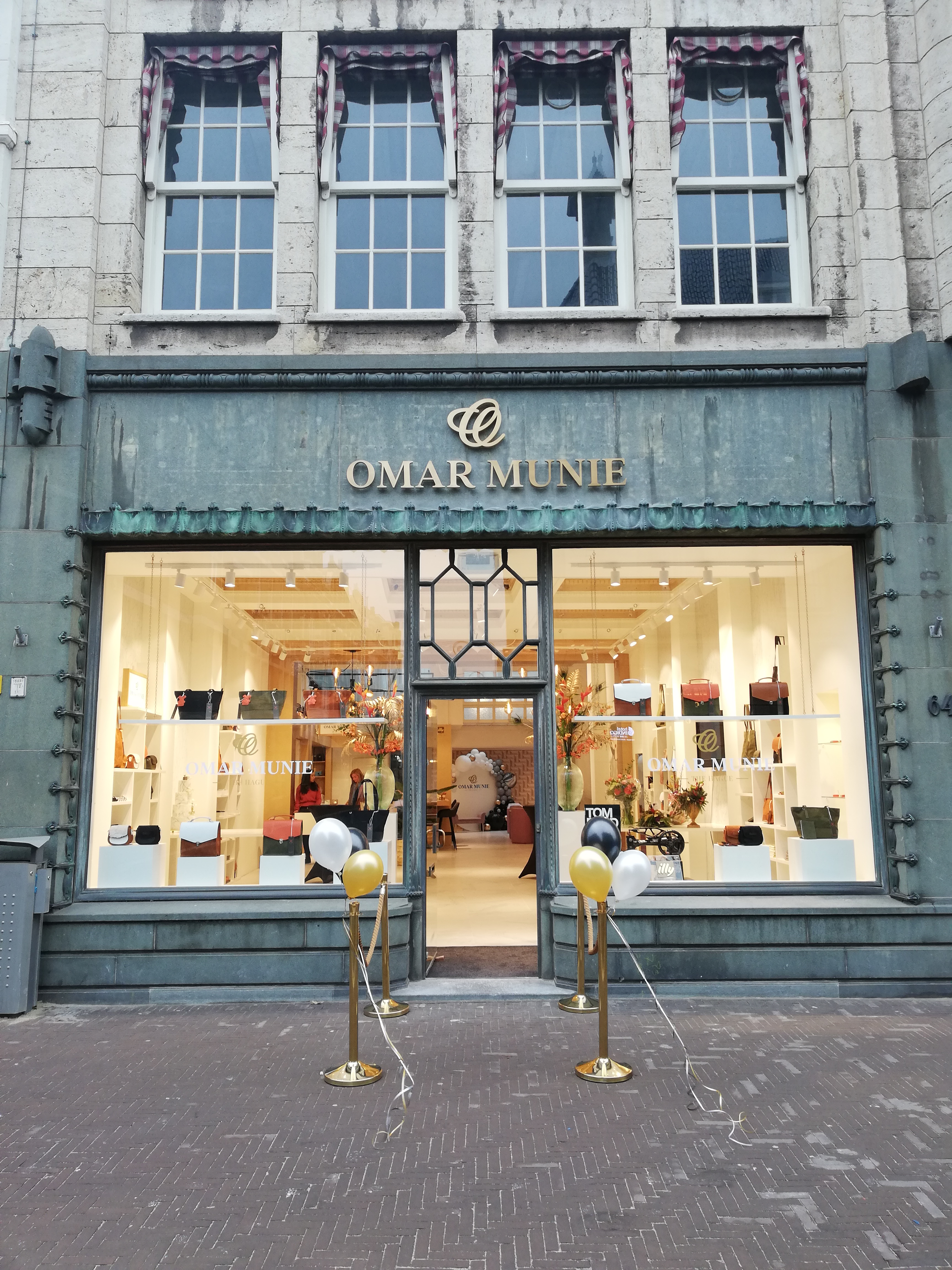 Nieuwe winkel Noordeinde 64 in Den Haag